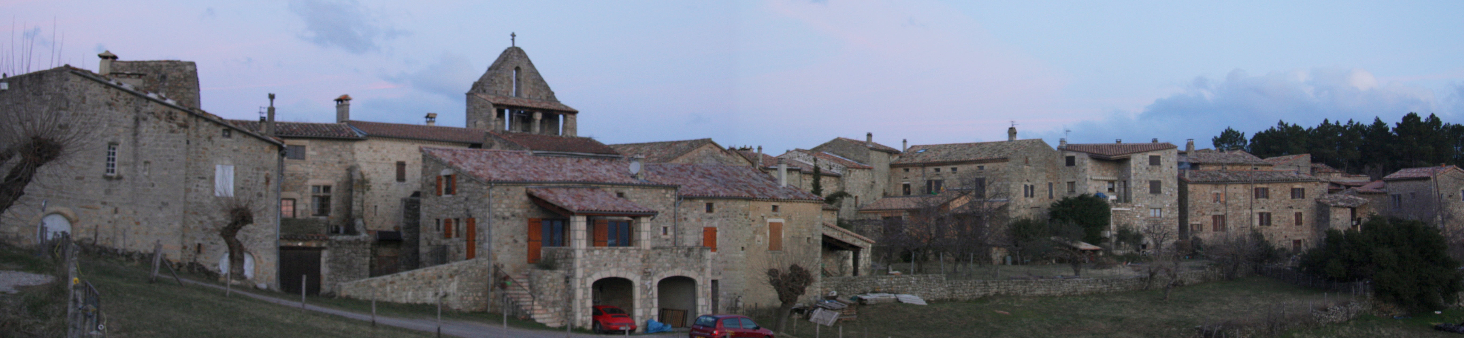 Panorama d'Ailhon, vue depuis la route de Fons